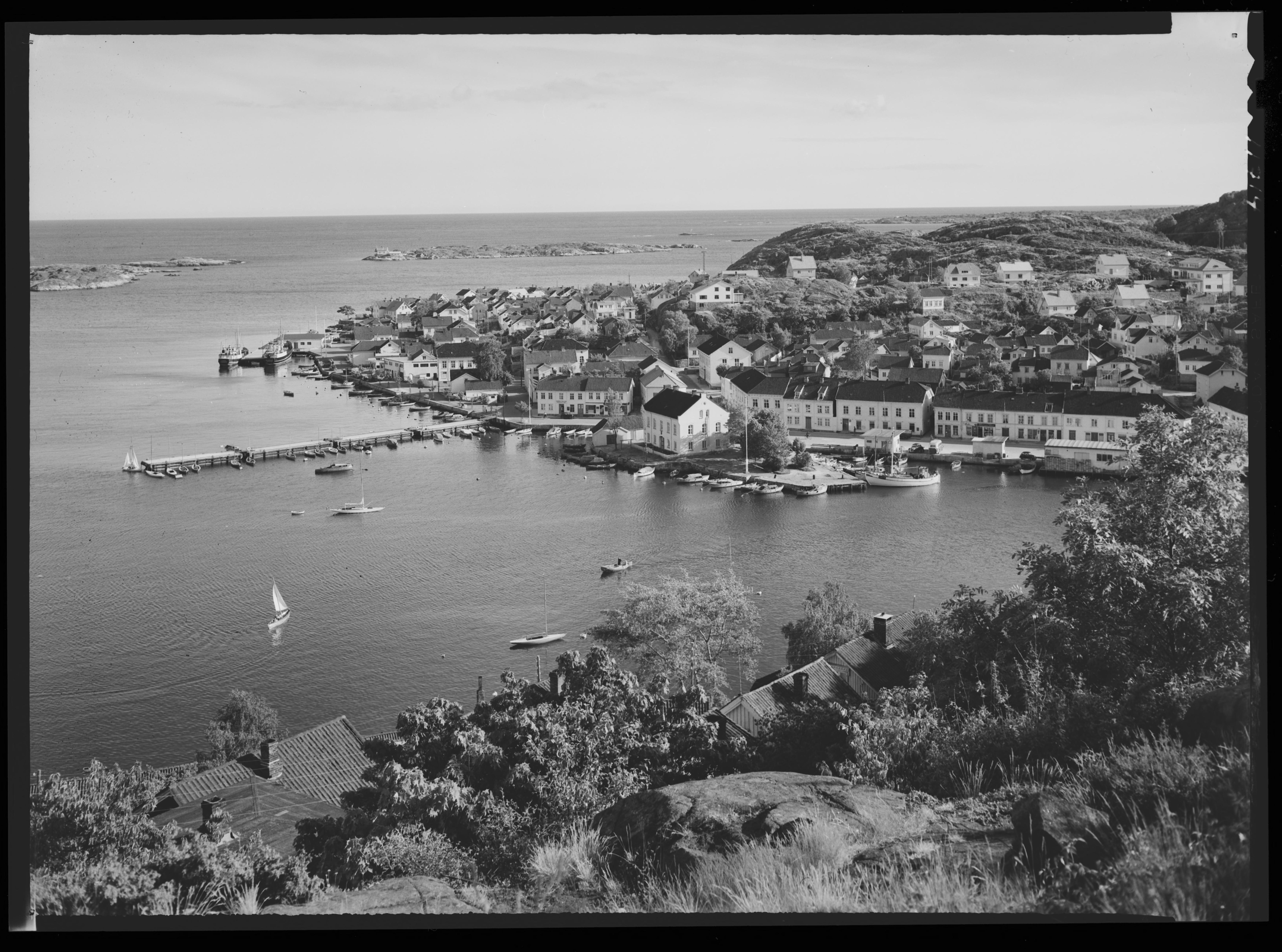 Bildet er hentet fra Nasjonalbibliotekets bildesamling. Anmerkninger til bildet var: Fotograf : ukjent Risør, Risør, Aust Agder